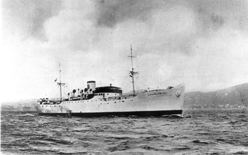 Das italienische Motorschiff Capitano Cecchi als Bananenfrachter, ab 1940 als Hilfskreuzer eingesetzt